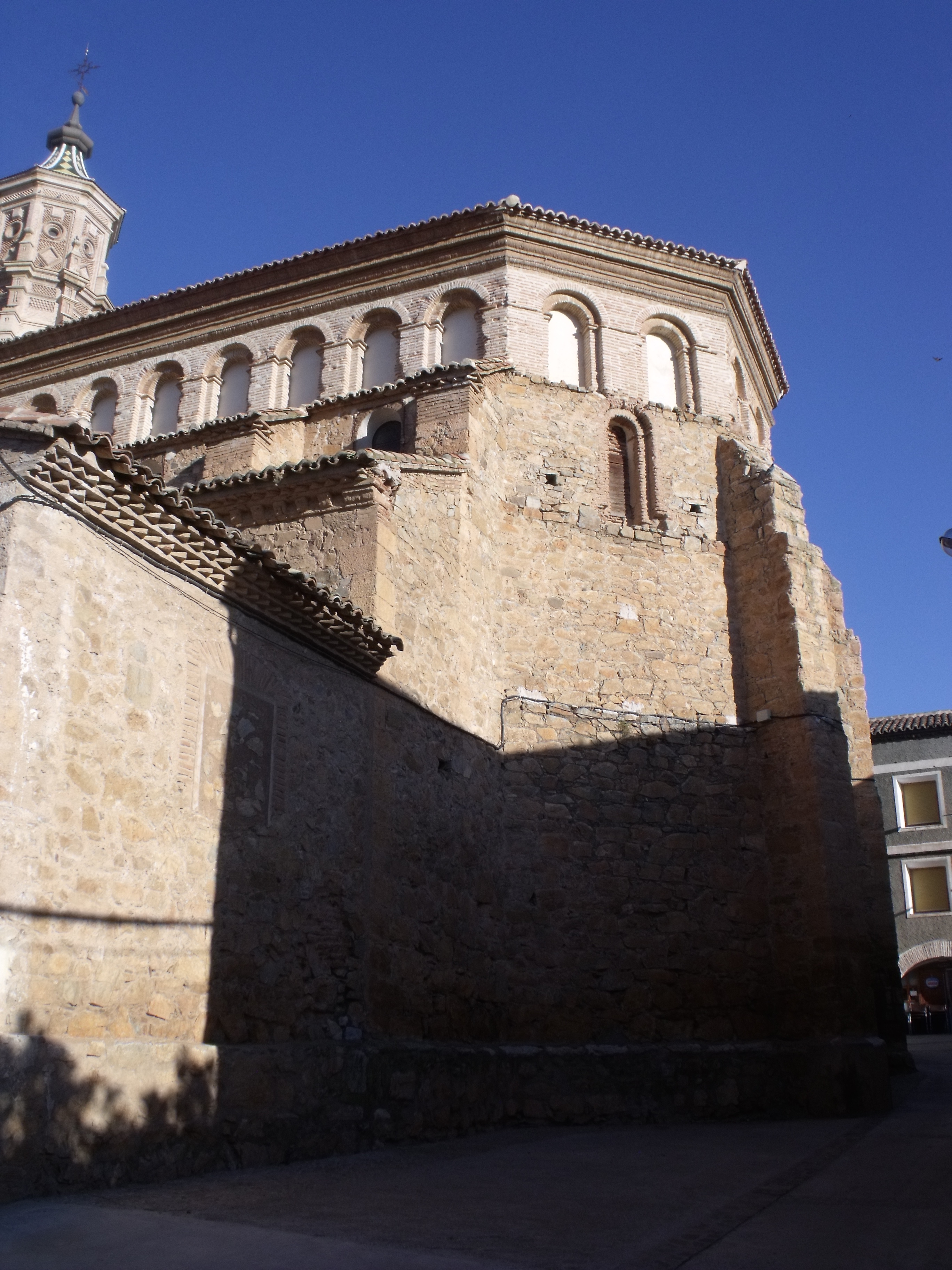 San Martín del Río